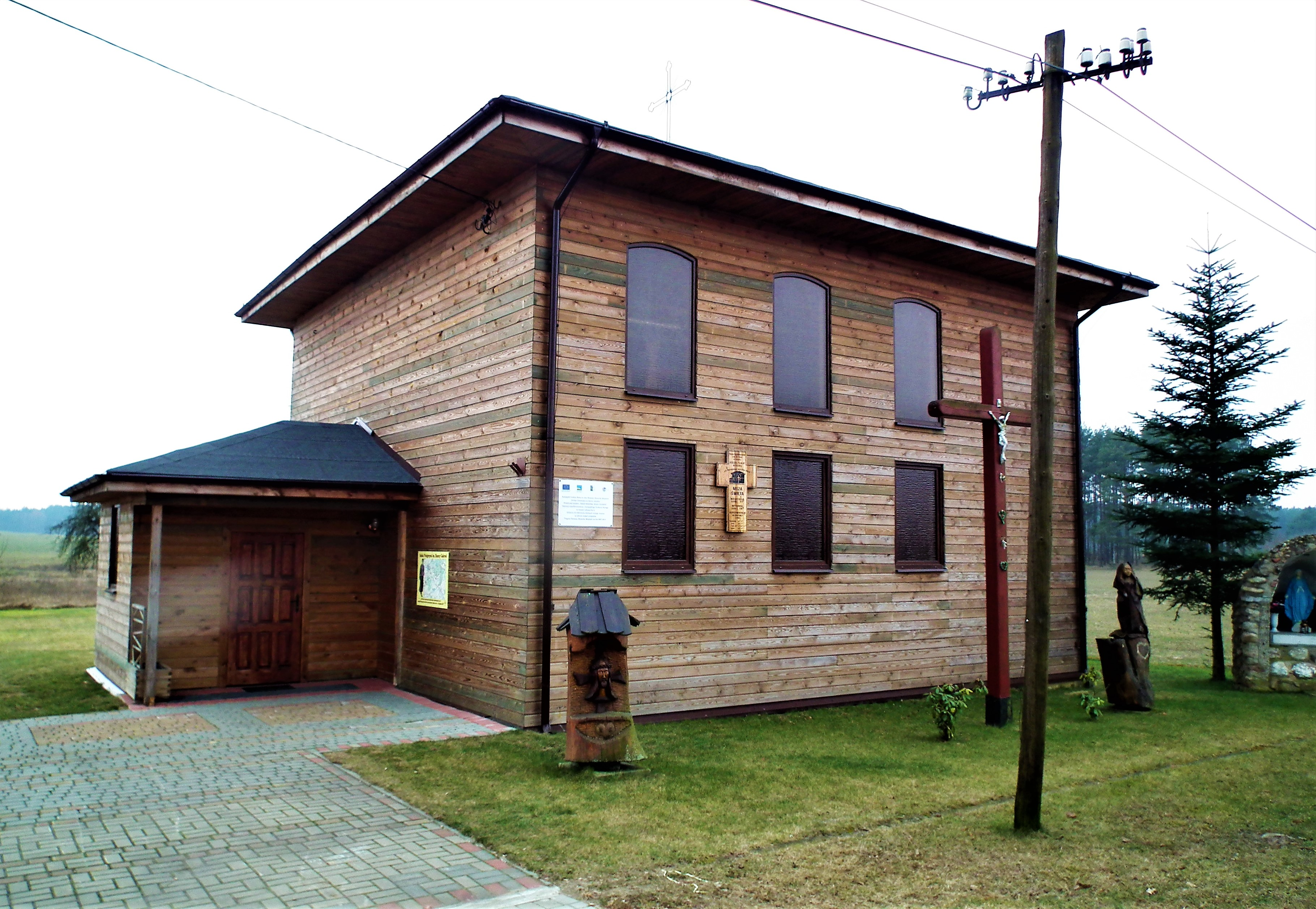 Kościół filialny Najświętszego Serca Pana Jezusa w Rudnej, parafia Łobżenica.